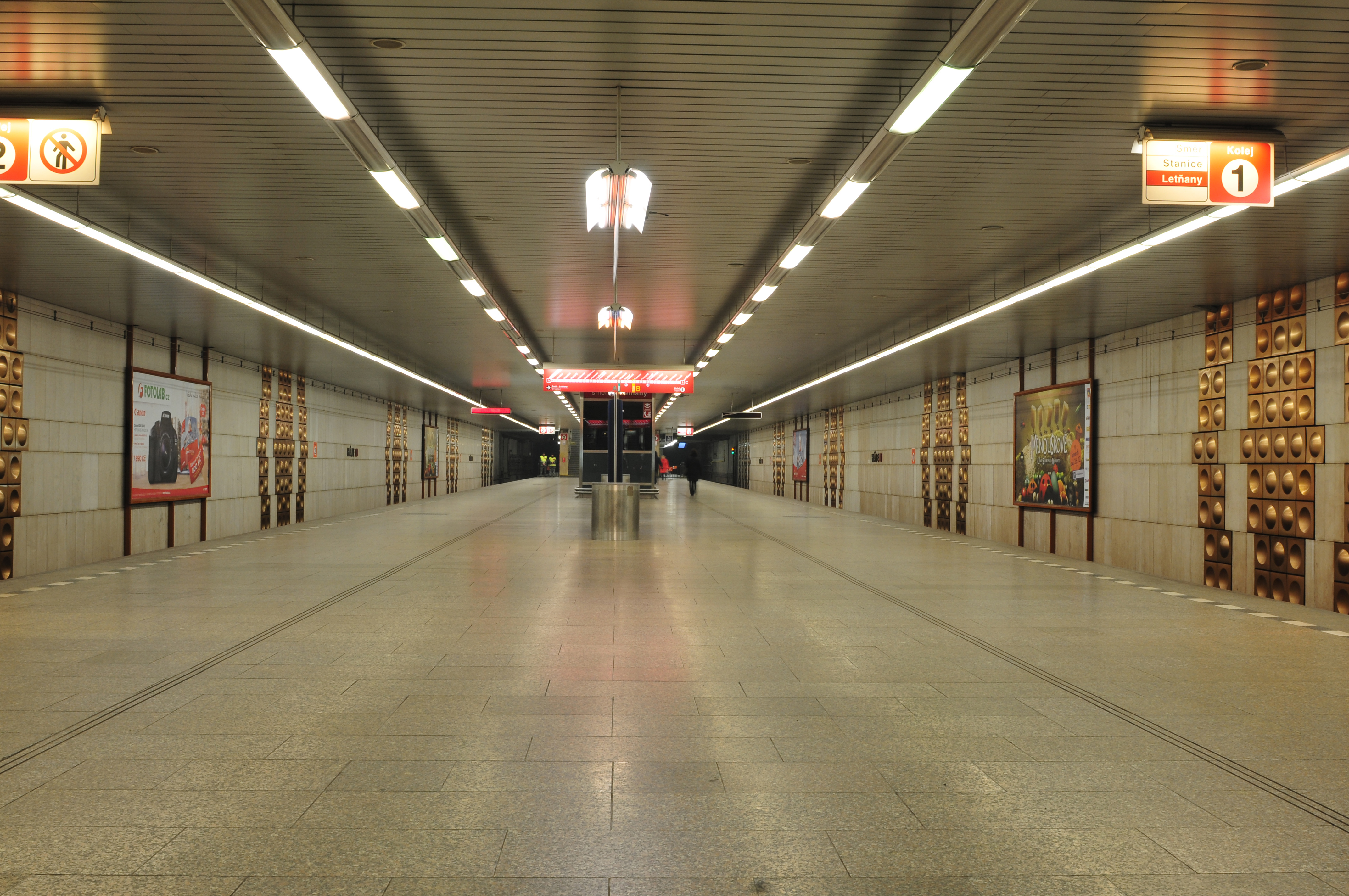 Metro Praha